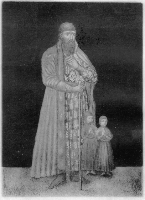 Спиридон Ширай - війт міста Стародуба у 1681—1708 роках. Портрет з колекції О. М. Лазаревського, раніше зберігався у церкві села Спиридонова Буда.